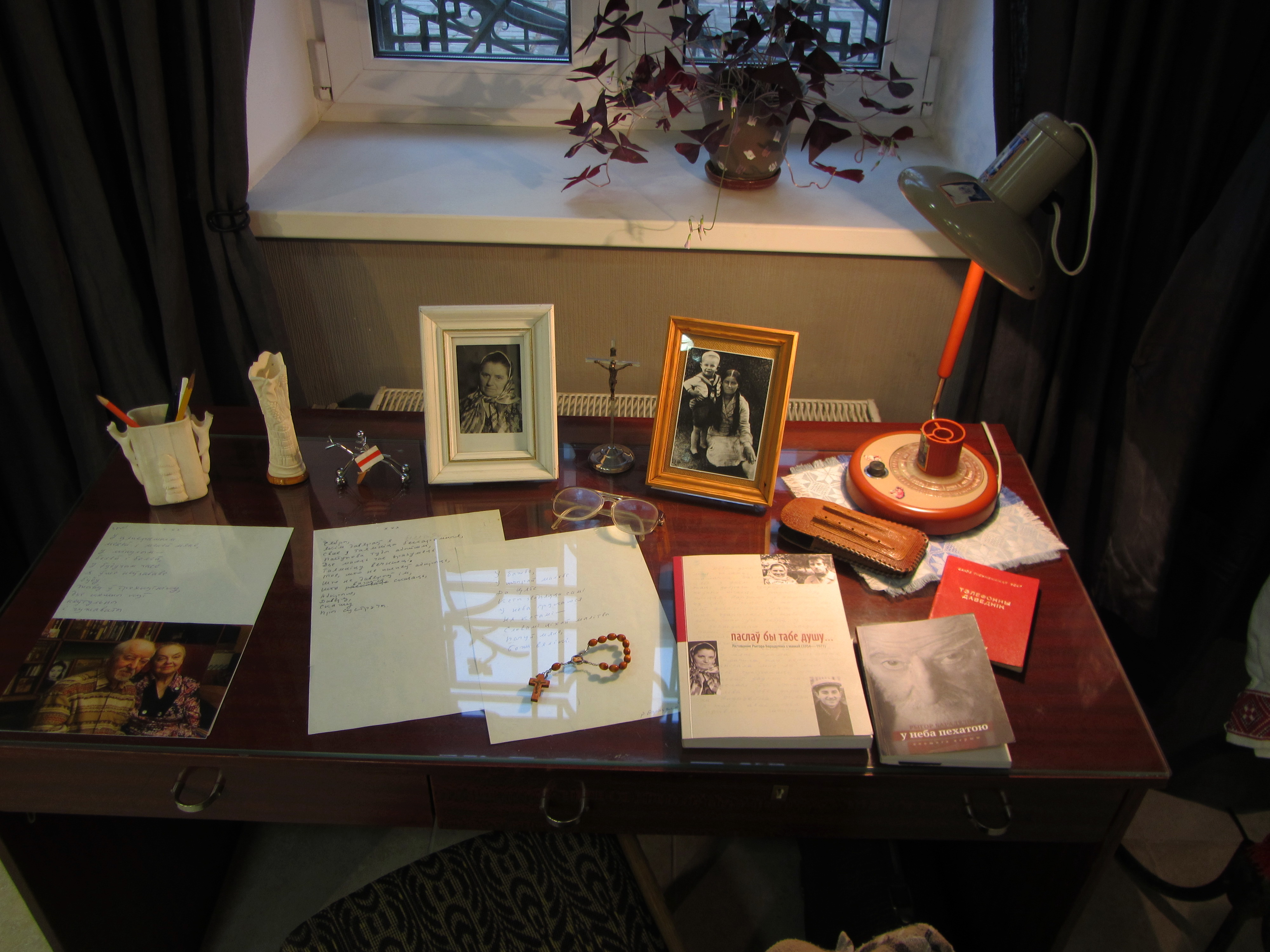 Беларуская (тарашкевіца): Выстаўка да 80-годзьдзя зь дня нараджэньня Рыгора Барадуліна ў музэі Максіма Багдановіча ў Менску, арганізаваная Дзяржаўным музэем гісторыі беларускай літаратуры.